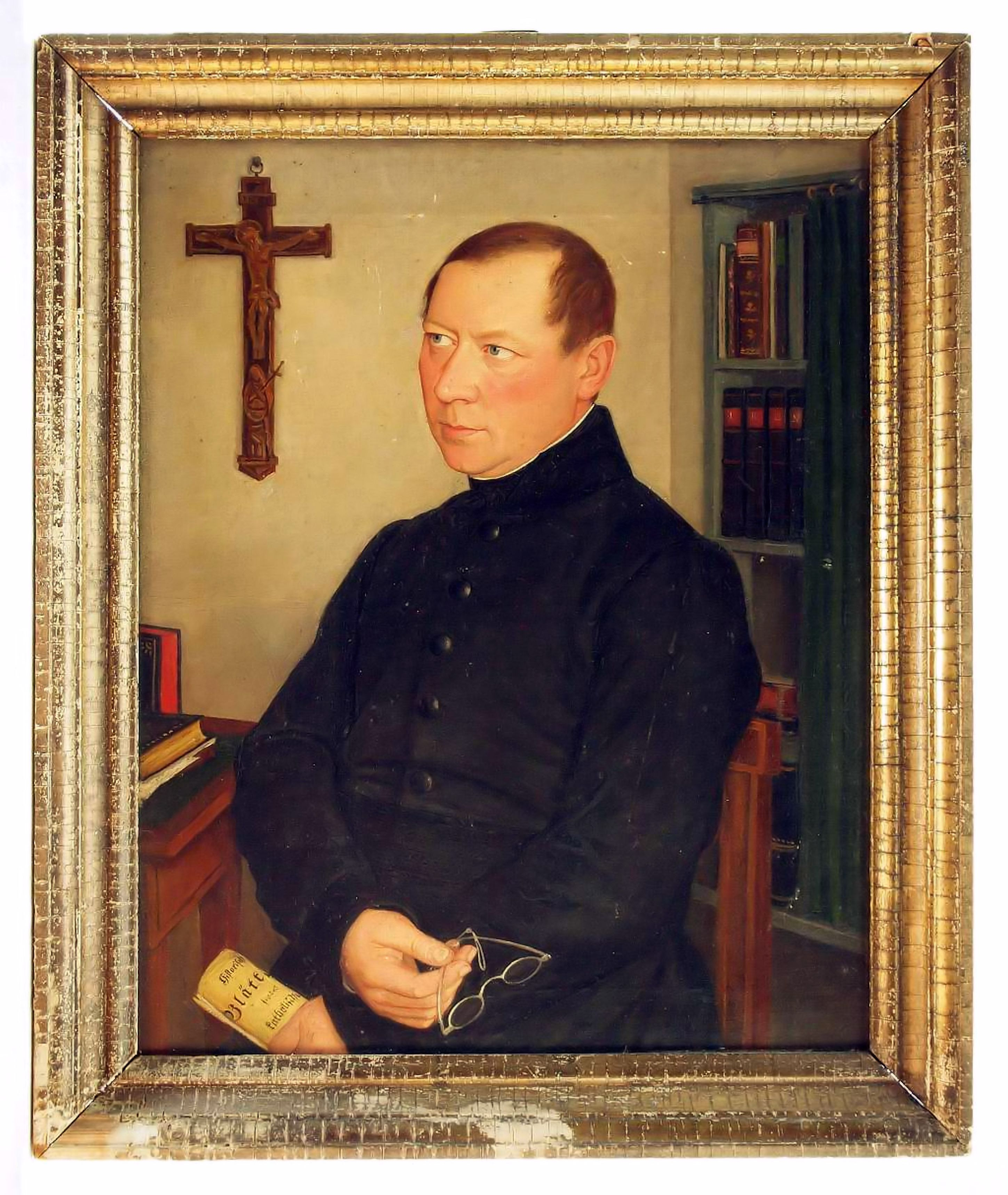 Porträt von Marquard Curtius († 1874), Renoncenphilister des Corps Suevia München, Pfarrer in Illertissen.